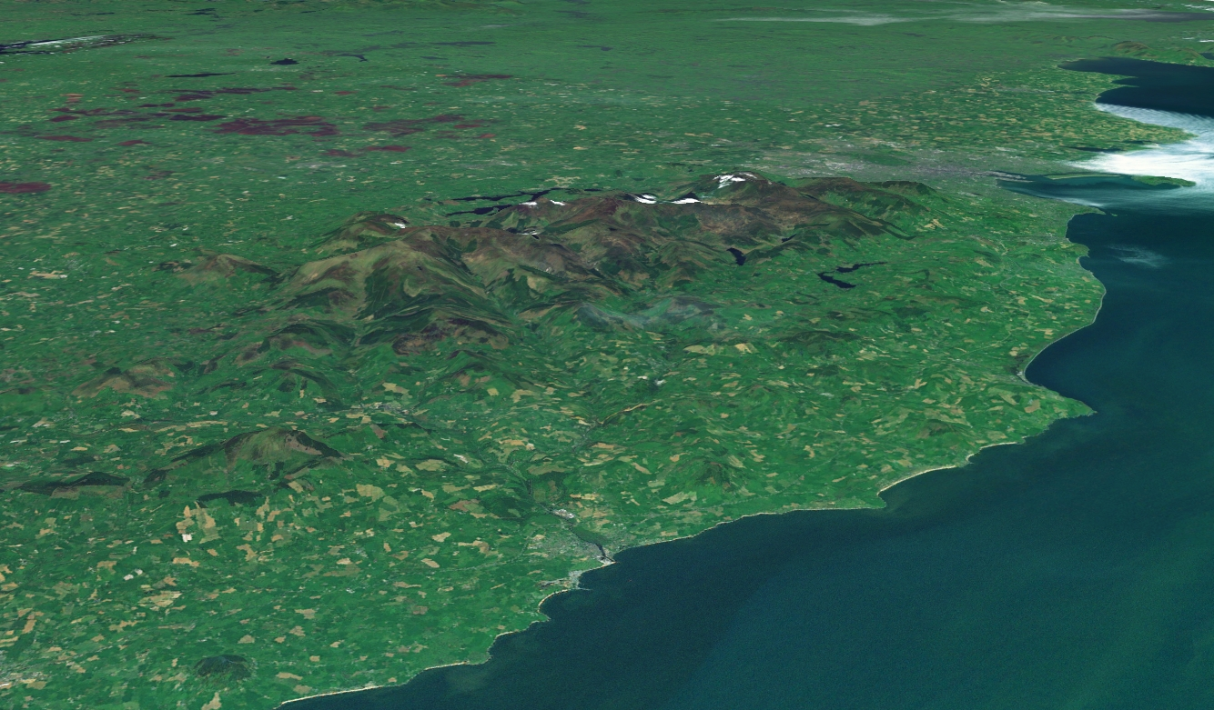 Massif des Montagnes de Wicklow, vu depuis la Mer d'Irlande ; à l'arrière-plan à droite, la ville de Dublin. Note : les taches blanches sont des nuages.